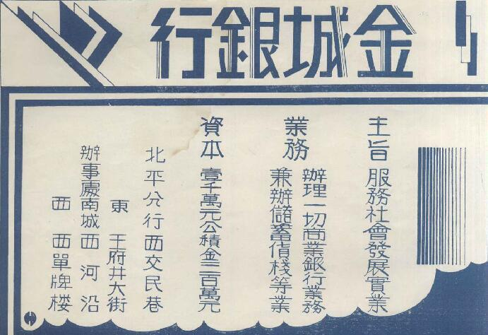 铁展 1934-1 金城银行